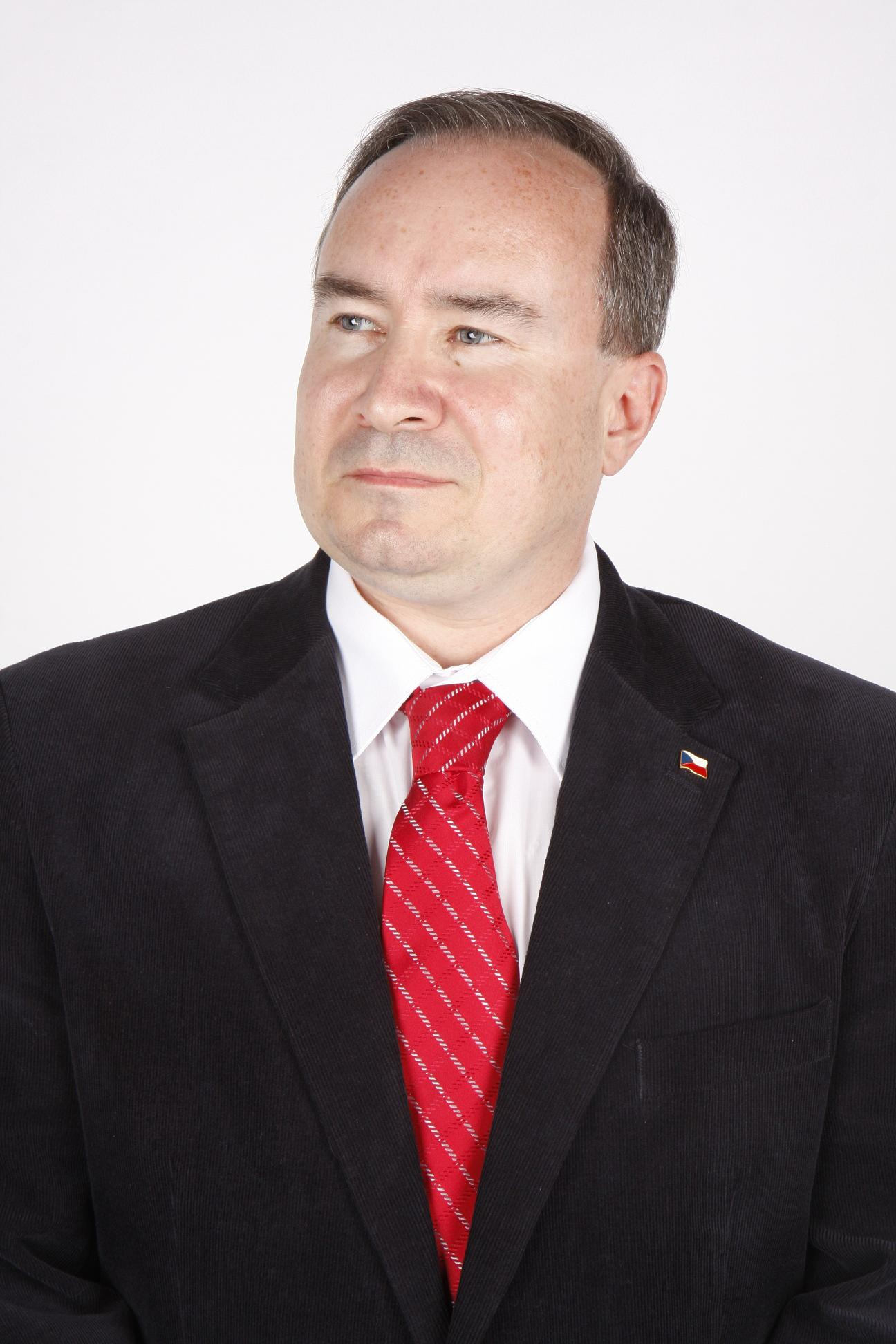 Tomáš Vandas Foto